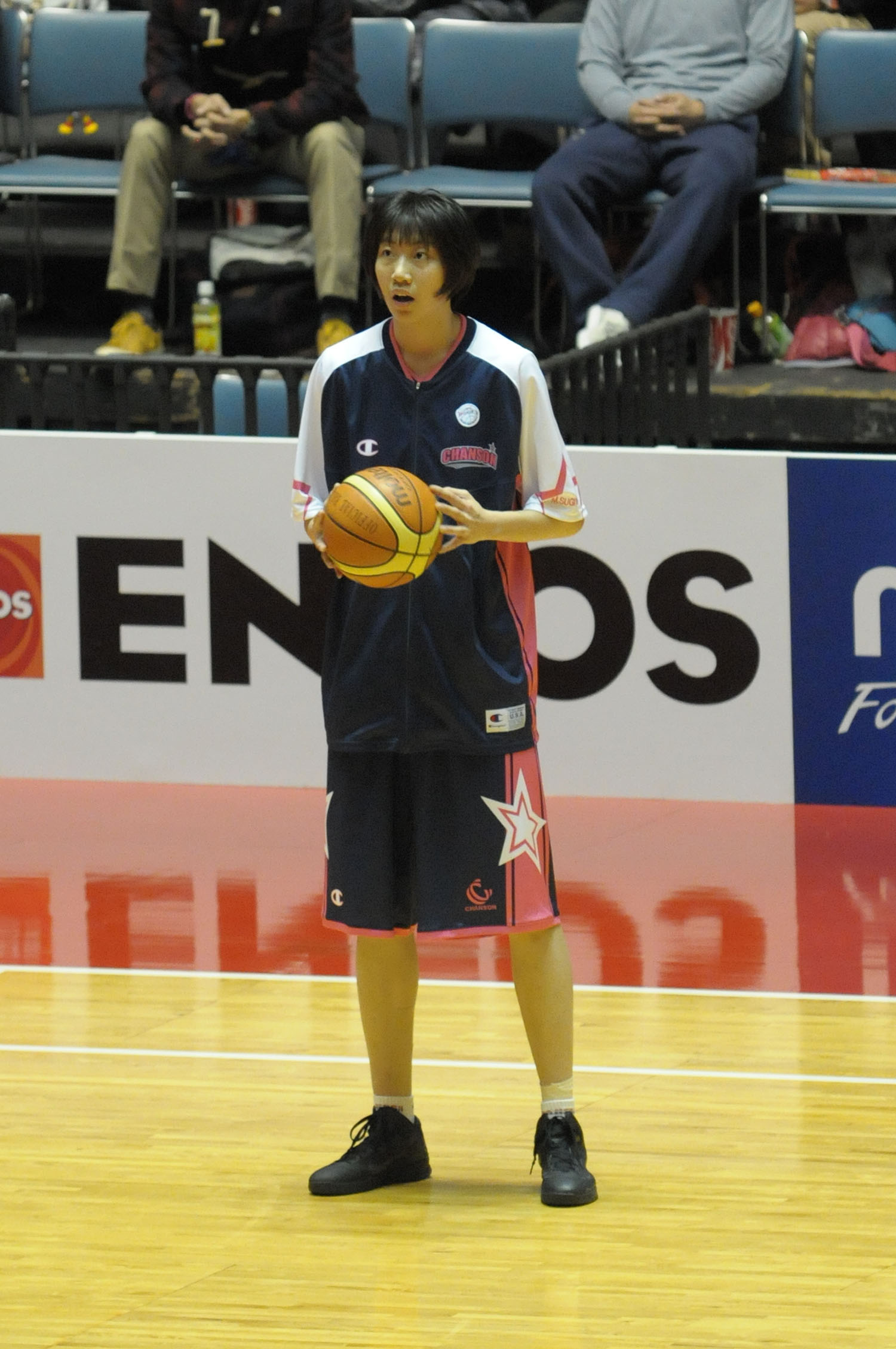 シャンソンVマジック、杉山美由希選手。代々木第一体育館で。